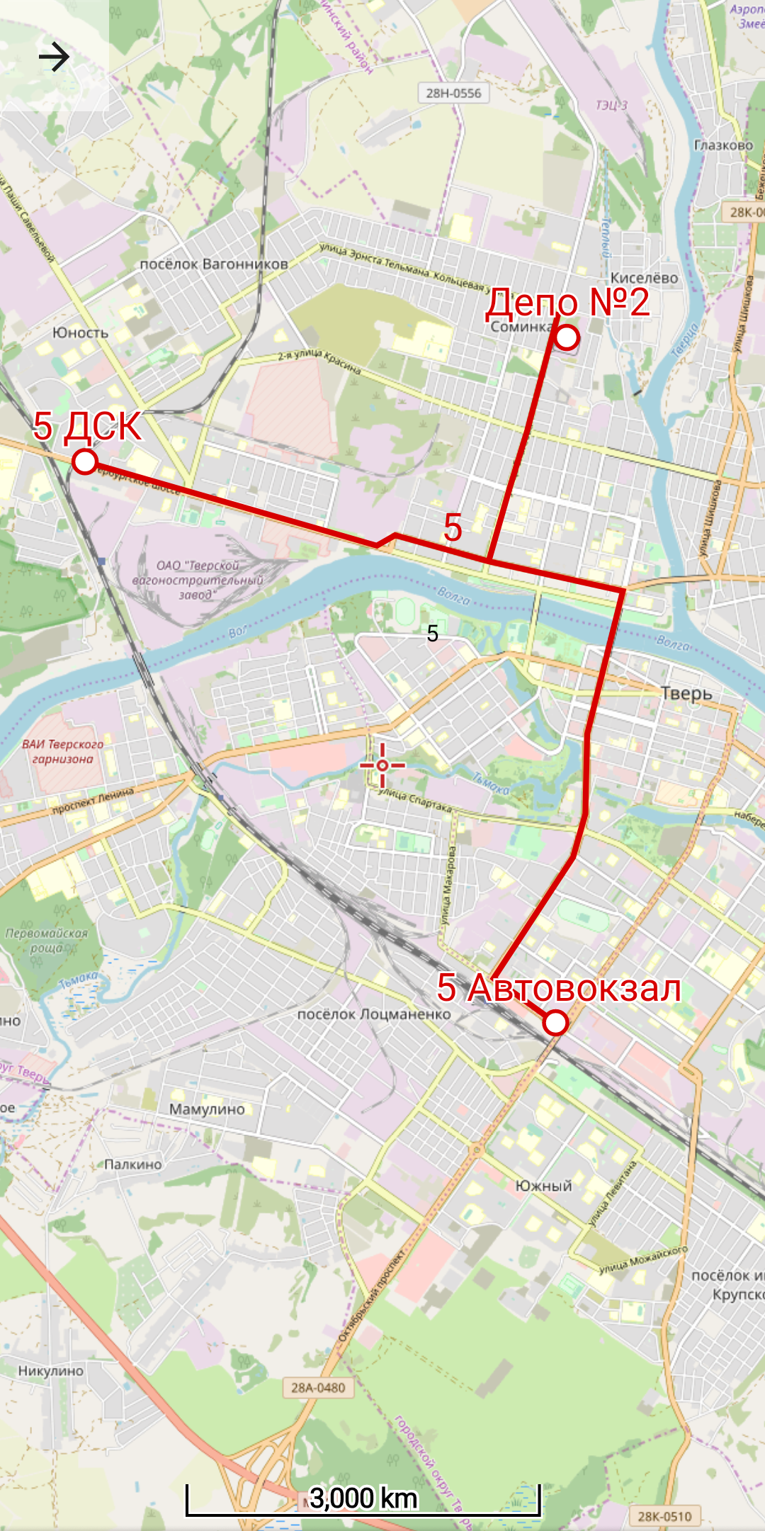 Карта Тверского трамвая в 2016-207 году